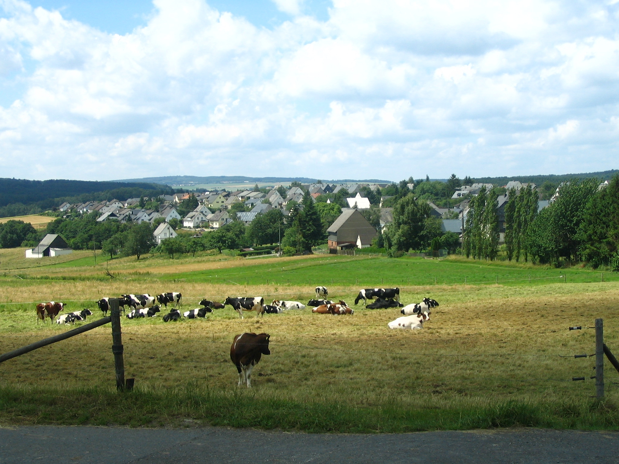 Laufersweiler in the Hunsrueck area, Germany